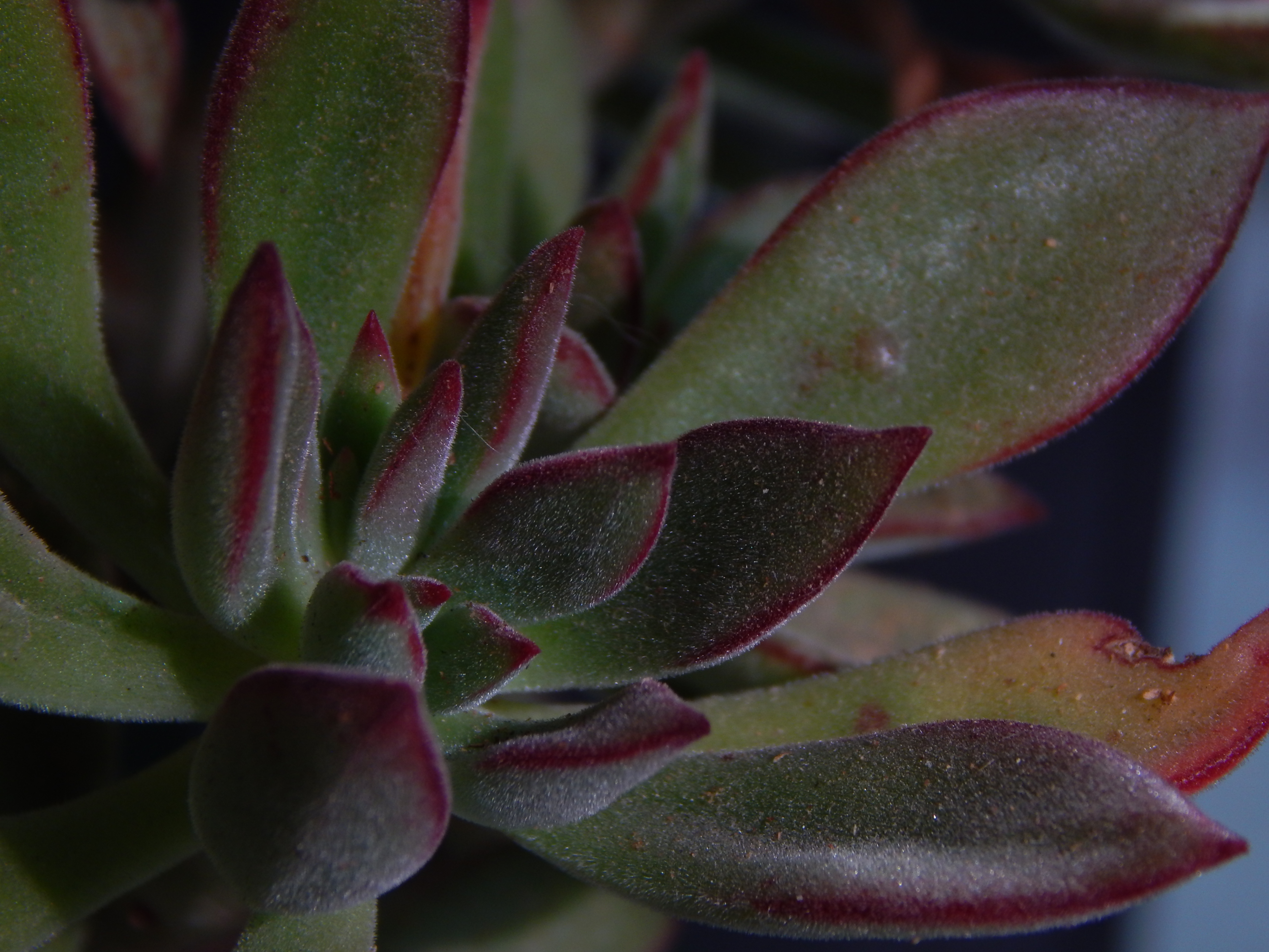 Hojas